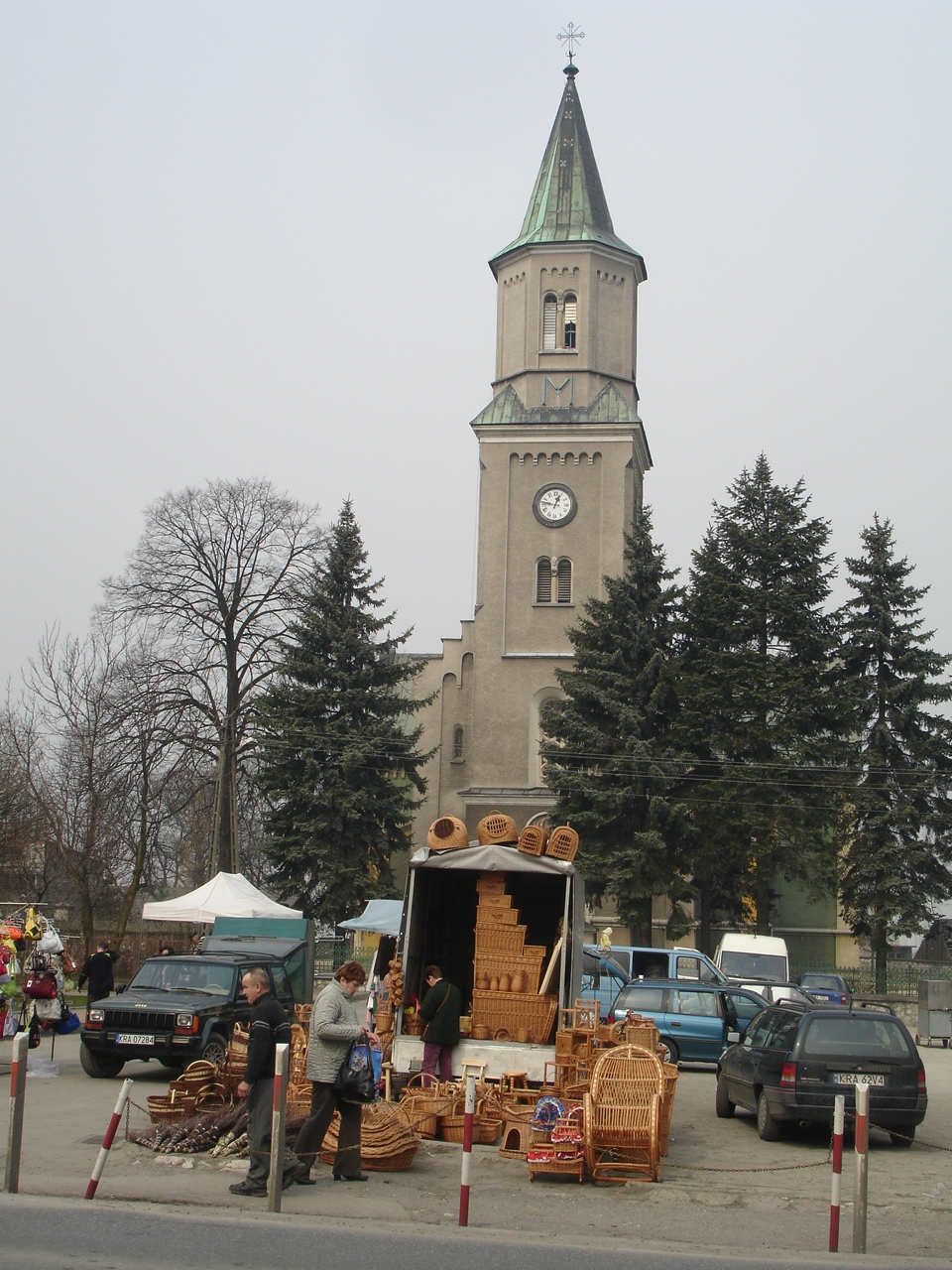 Church in liszki